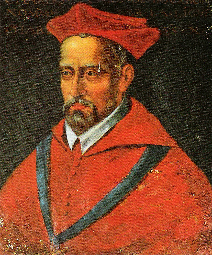 Porträt des Kardinals Charles de Bourbon, als "Karl X." König von Frankreich unter der Katholischen Liga